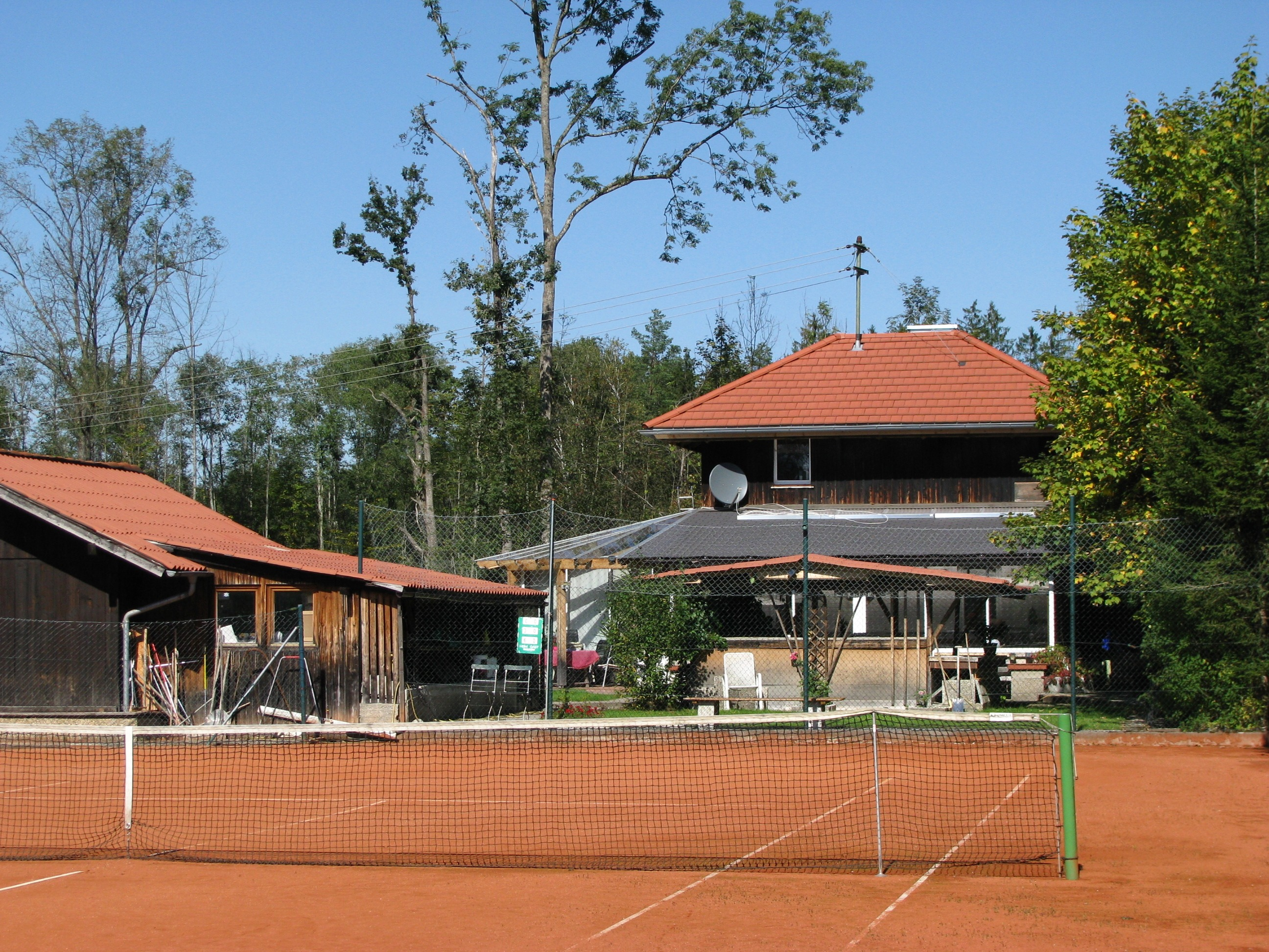 Ehemaliger Bahnhof Fletzen, heute Tennisanlage und in Privatbesitz.